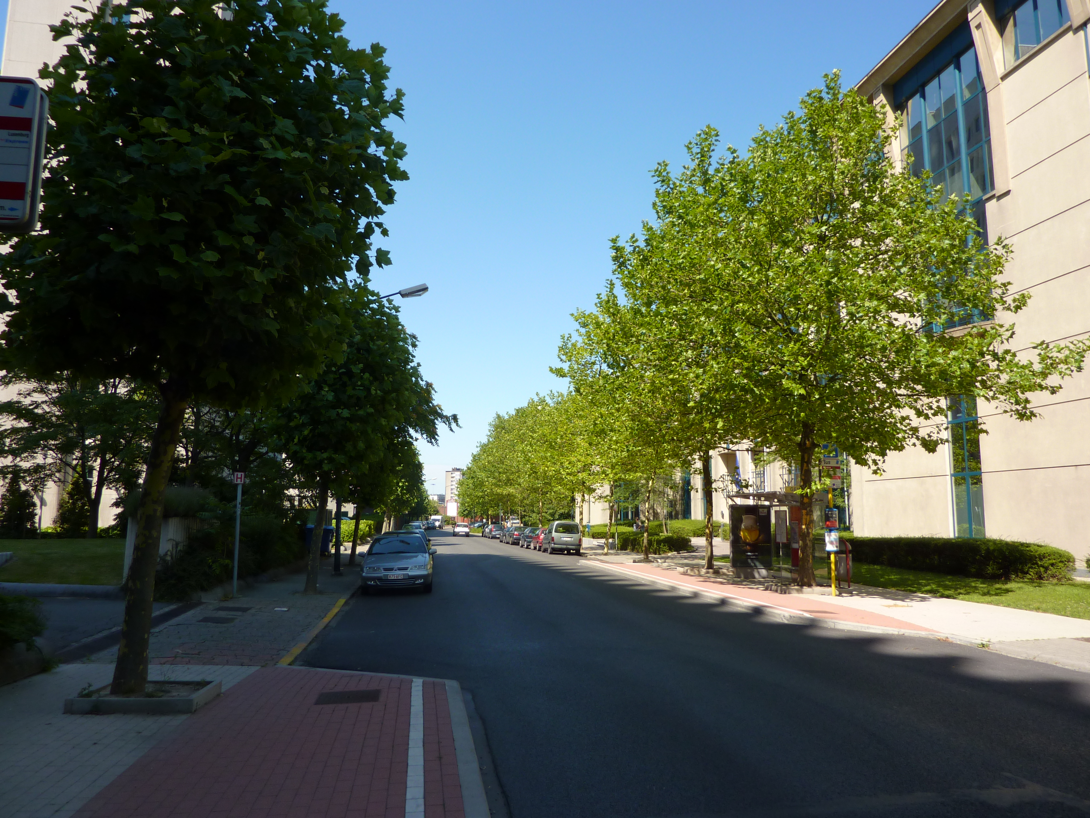 La rue de Genève à Evere, Bruxelles, Belgique.